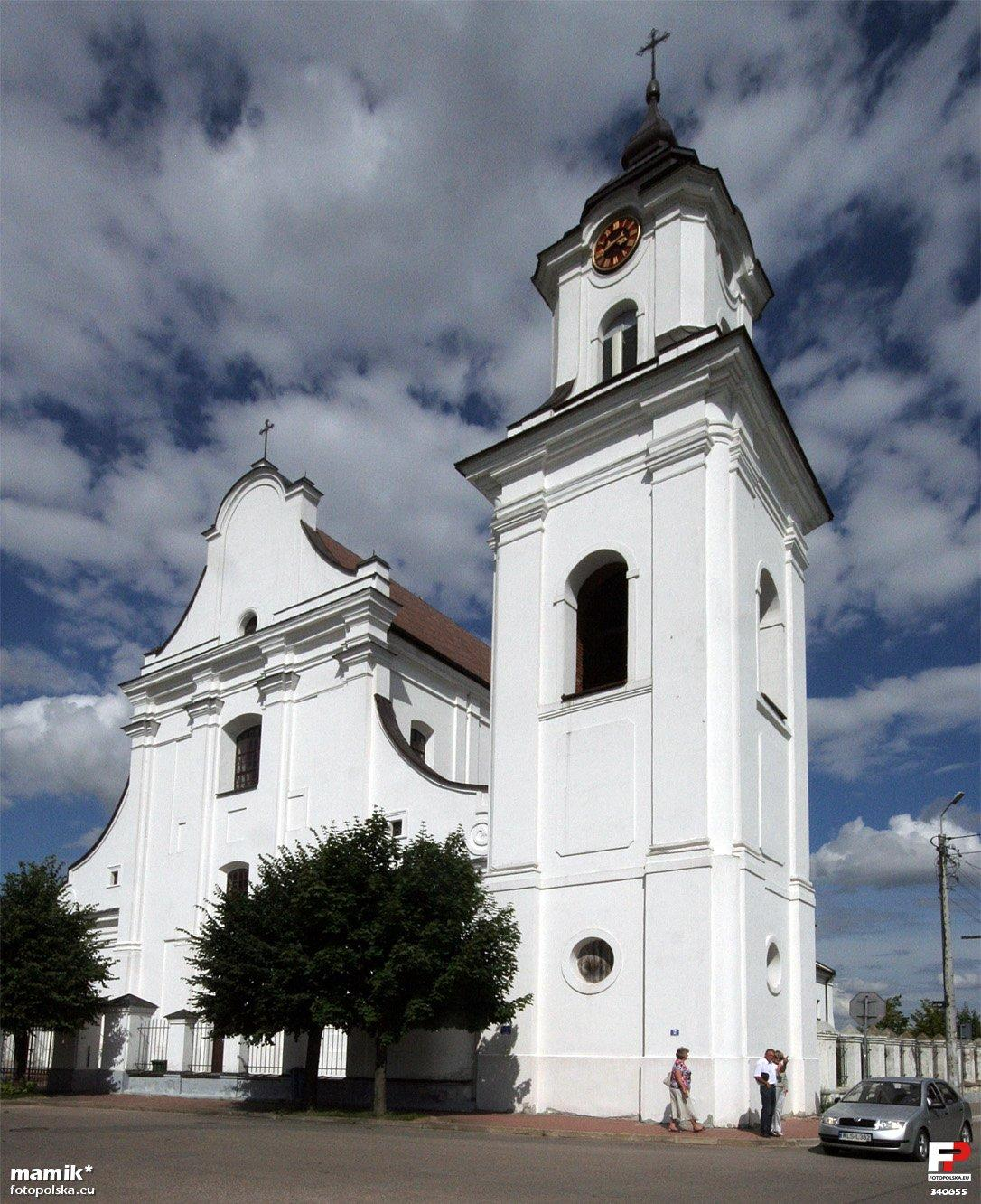 Barokowy kościół franciszkanów